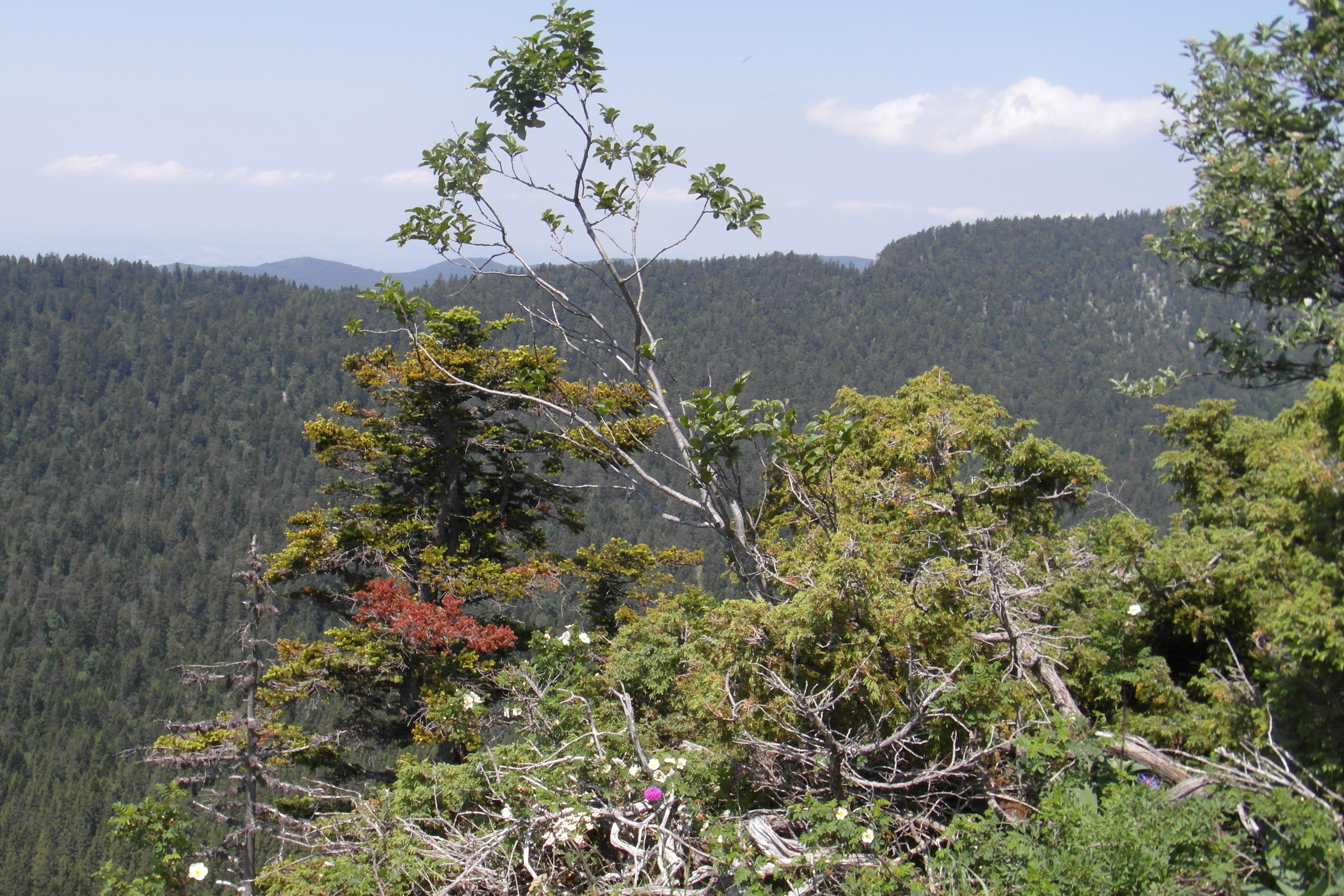 Foret de Villard belvédère de chateau julien